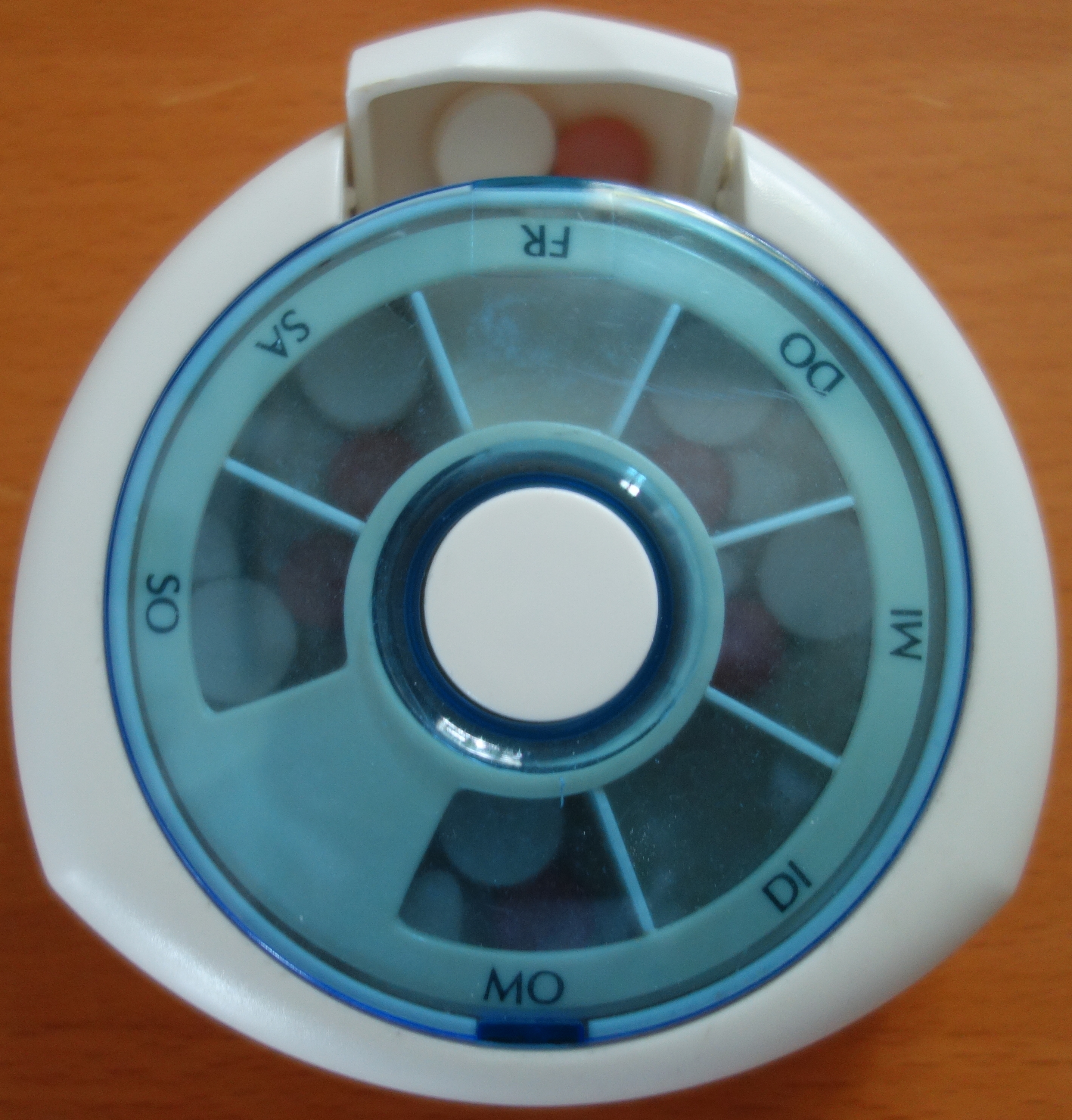 Runde Wochen-Pillenbox mit Druckschalter in der Mitte